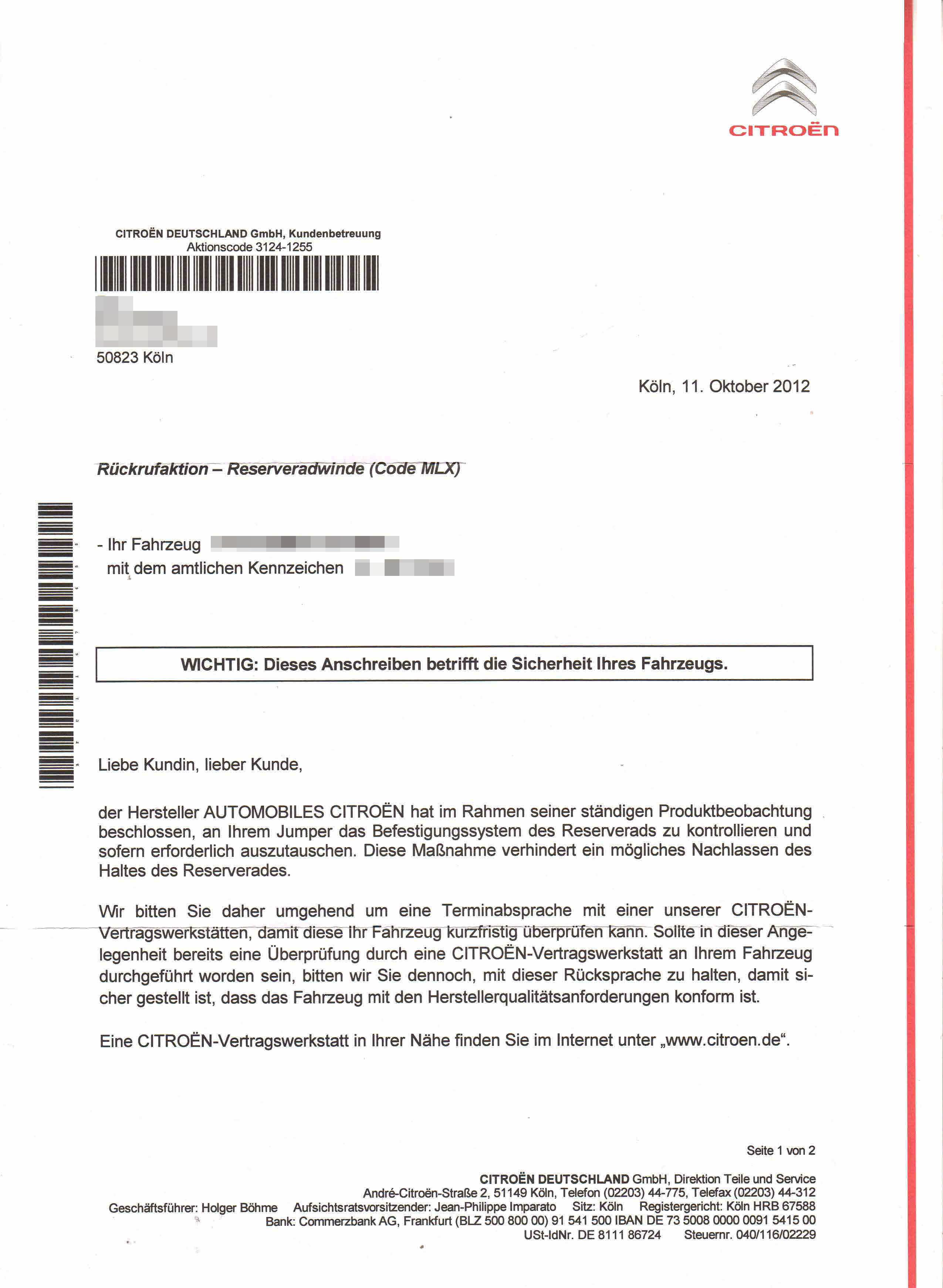 Brief von Citroën Deutschland: Rückrufaktion vom Modell Jumper zur Kontrolle und ggfs. Austausch der Reserveradbefestigung